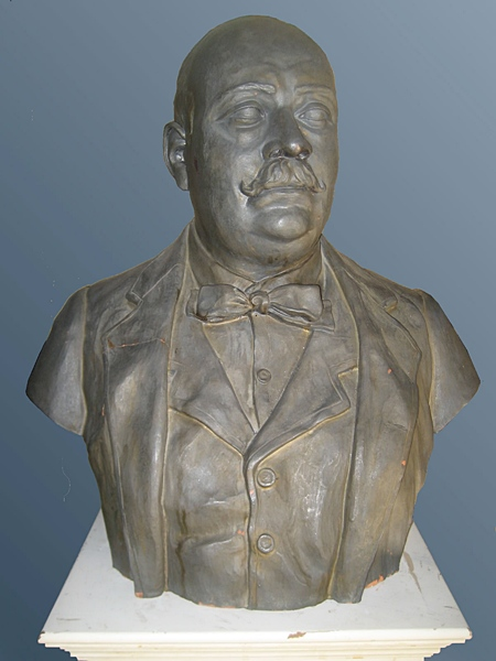 Busto de D. Antonio Chacón